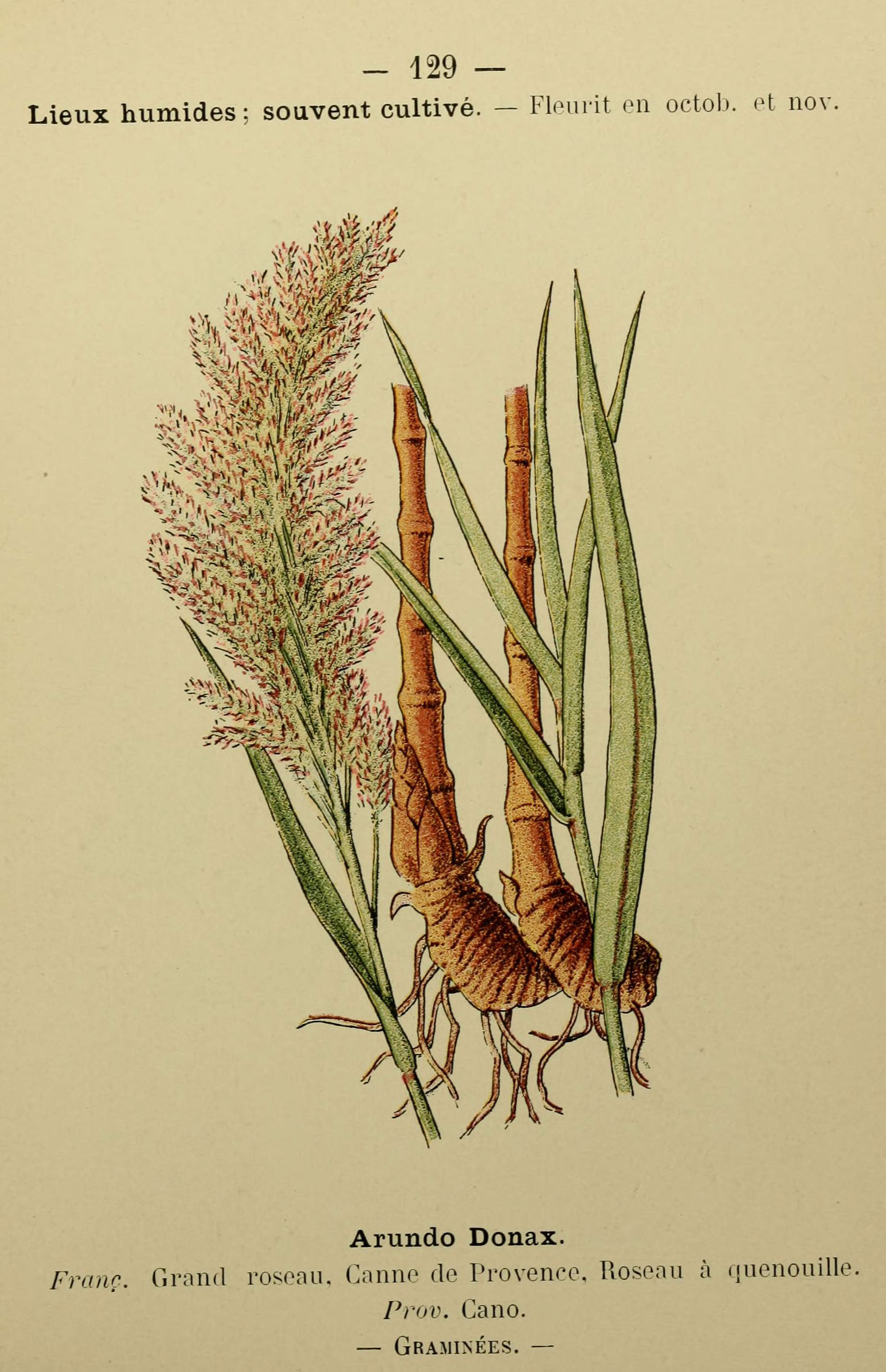 129 — Lieux humides; souvent cultivé. - Fleunt en octob. .H nov ^« Arundo Donax. Franc. C.rand rosoaii. Canne de Provence, Roseau h quenouille. Prov. Cano. — Graminées. —